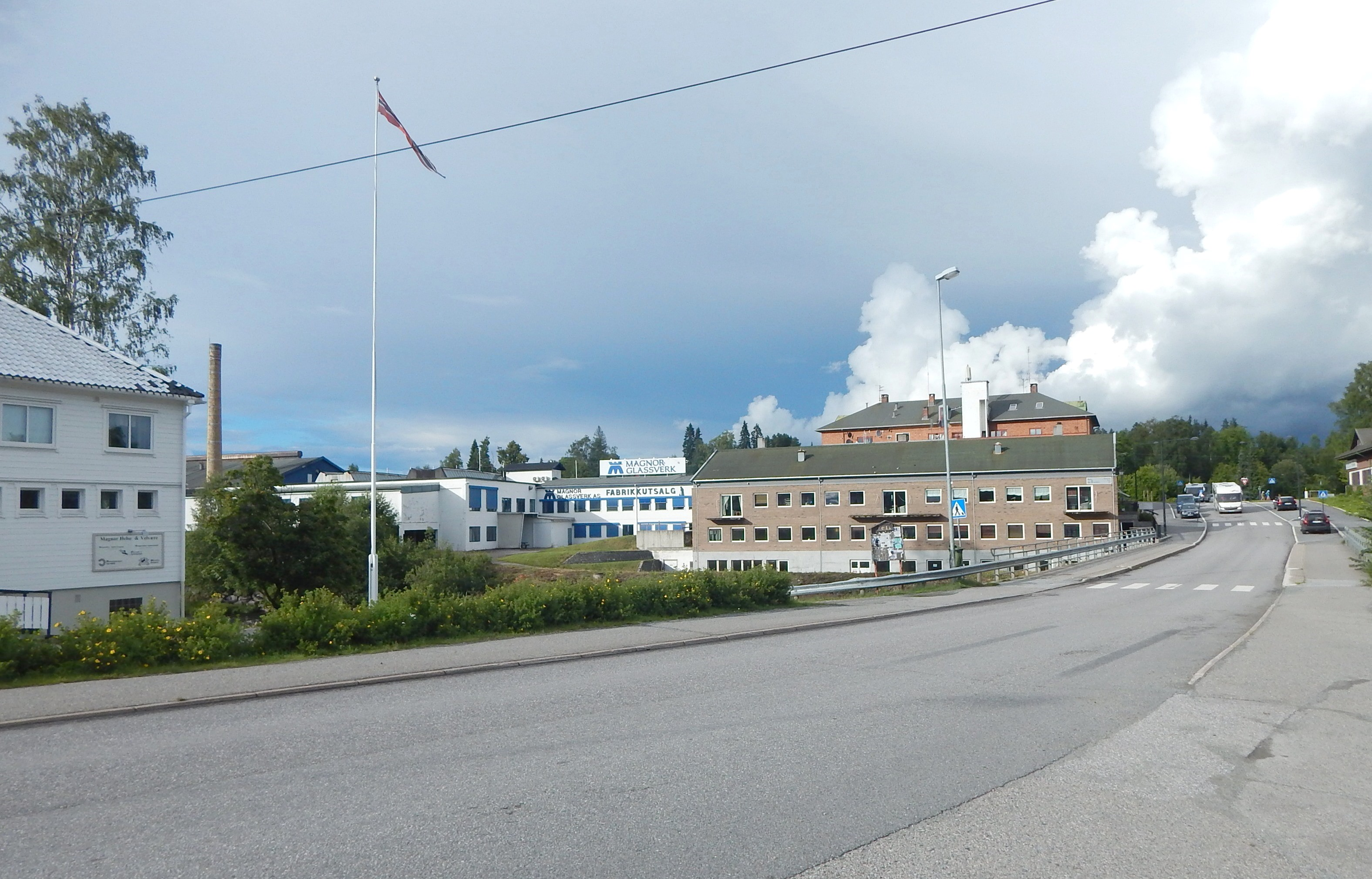 Gaustadvegen på Magnor, med glassverkets fabrikkutsalg